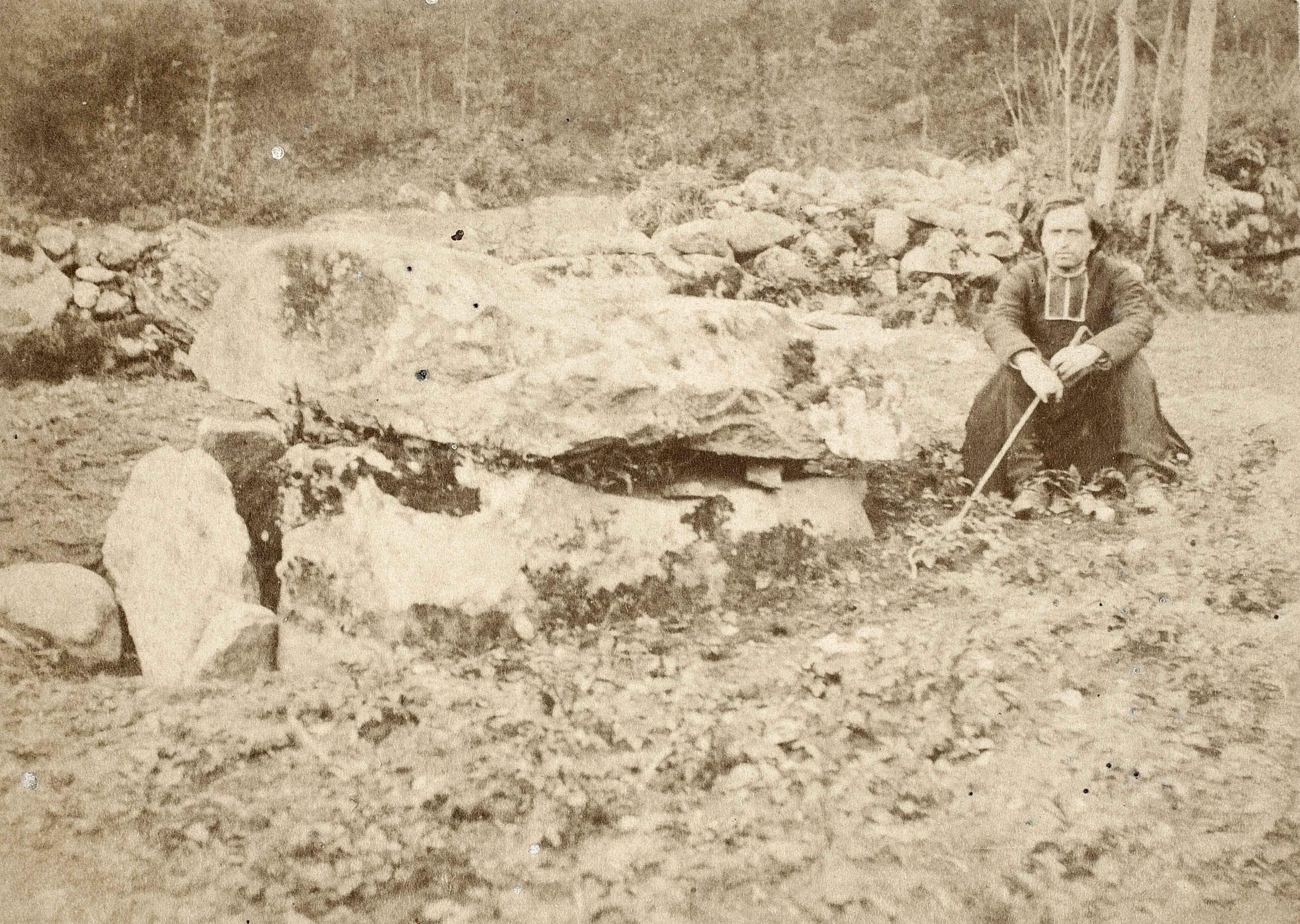 Fouilles de la nécropole proto-historique à incinérations et cercles de pierre menées en 1886 à Ayer, commune de Bordes-sur-Lez (Ariège)